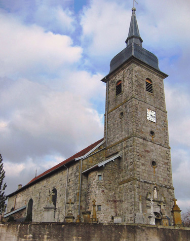 Eglise Saint-Basle